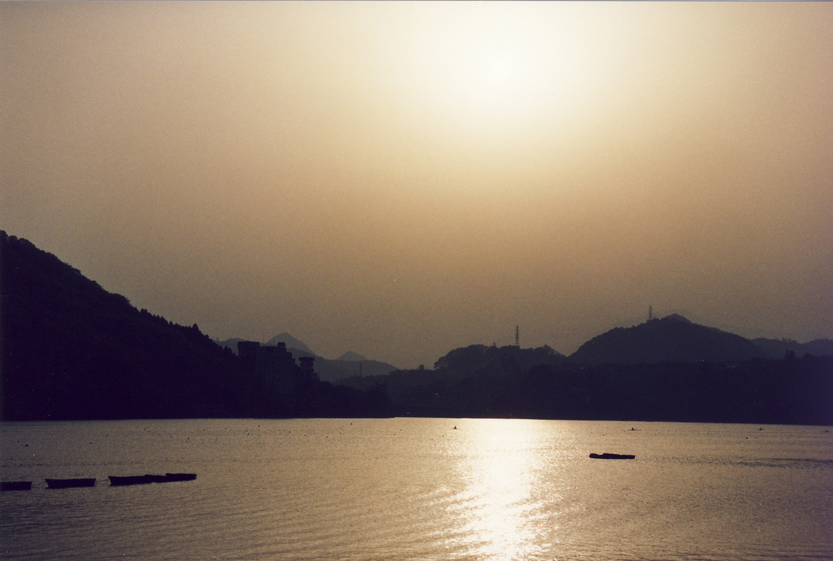 Lake Sagami-ko in Japan